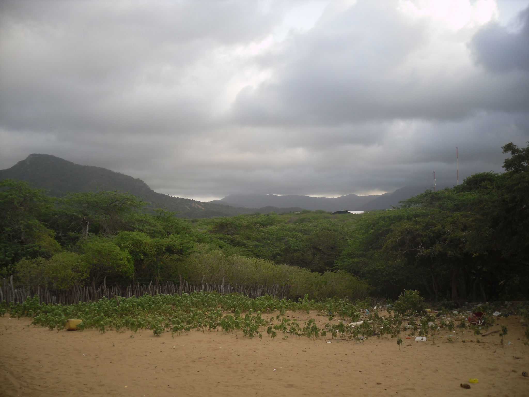 Ubicación: MANAURE, LA GUAJIRA